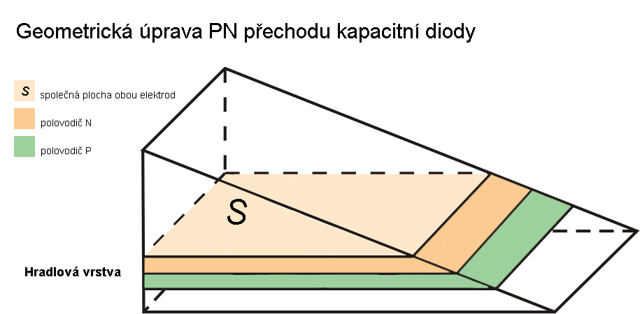 Geometrická úprava kapacitní diody pro zvýšení závislosti kapacity na napětí v závěrném směru autor: Vít Hněvkovský